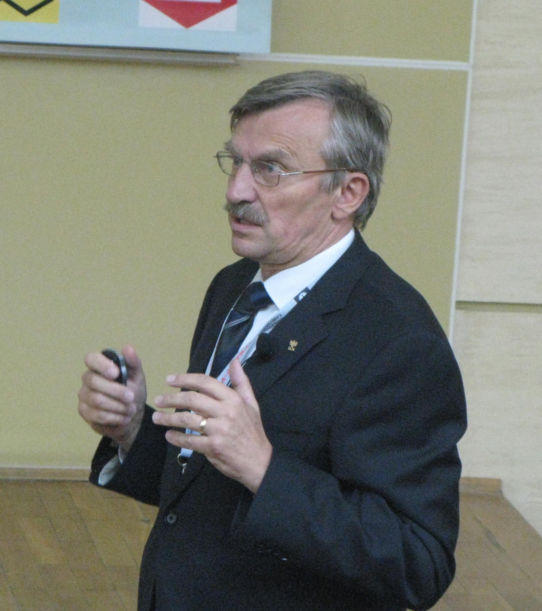 Bronisław Marciniak na zjeździe Polskiego Towarzystwa Chemicznego w Łodzi wygłasza wykład z okazji otrzymania Medalu Jana Zawidzkiego